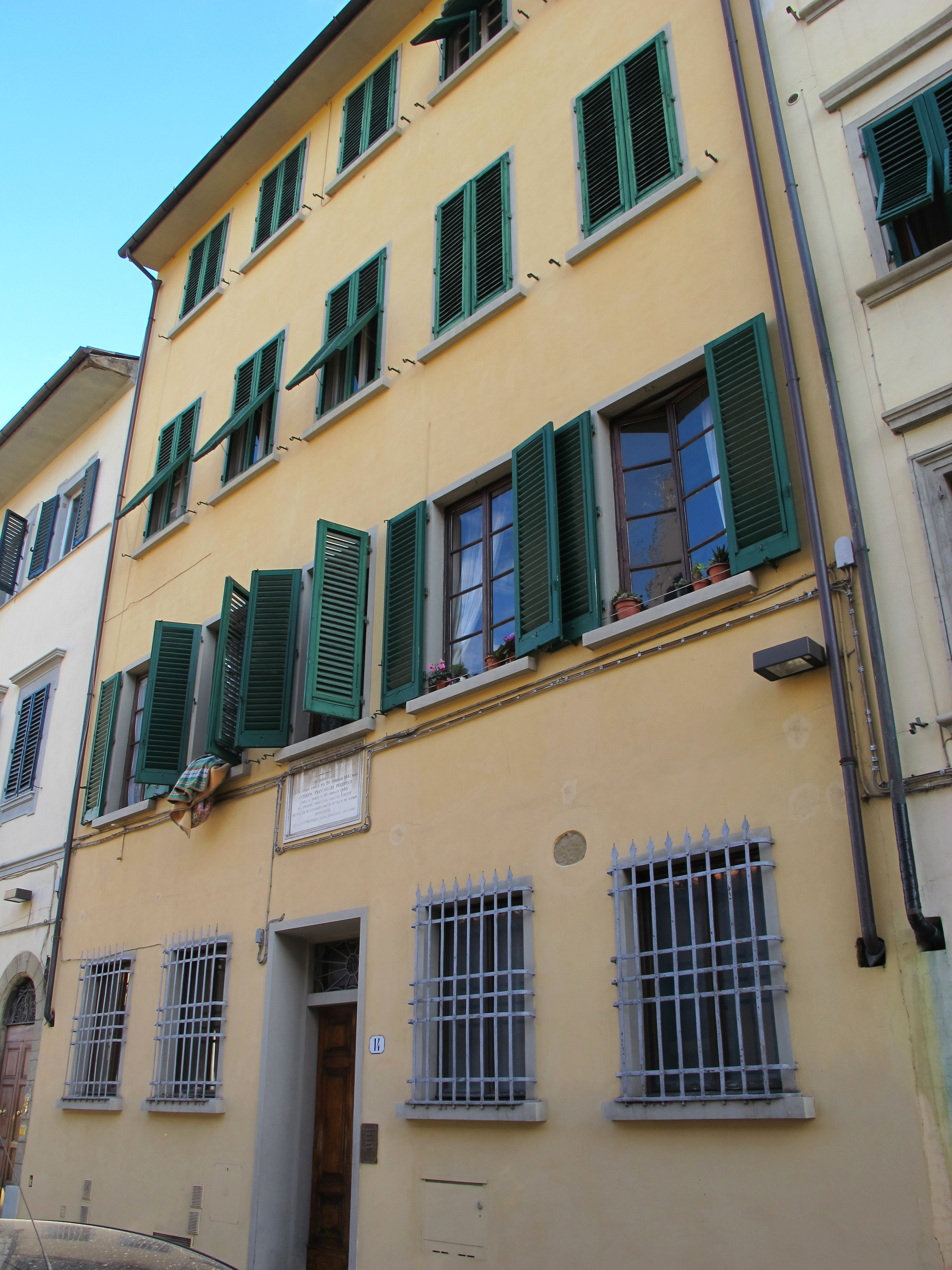 Via di mezzo 14, Casa di Caterina Franceschi Ferrucci